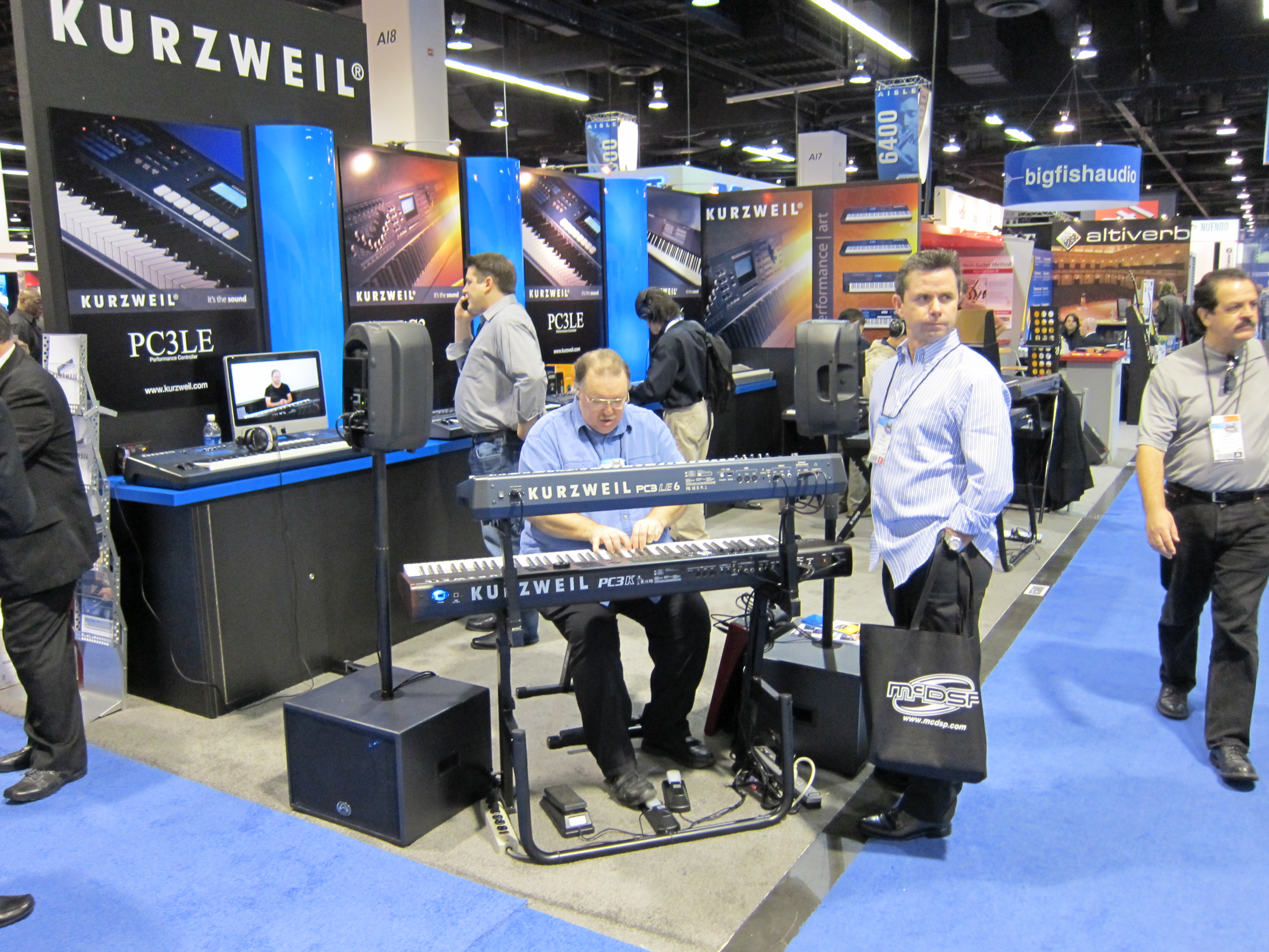 Winter NAMM 2010 Day 1 Kurzweil PC3LE6 Performance Controller Kurzweil PC3X Performance Controller